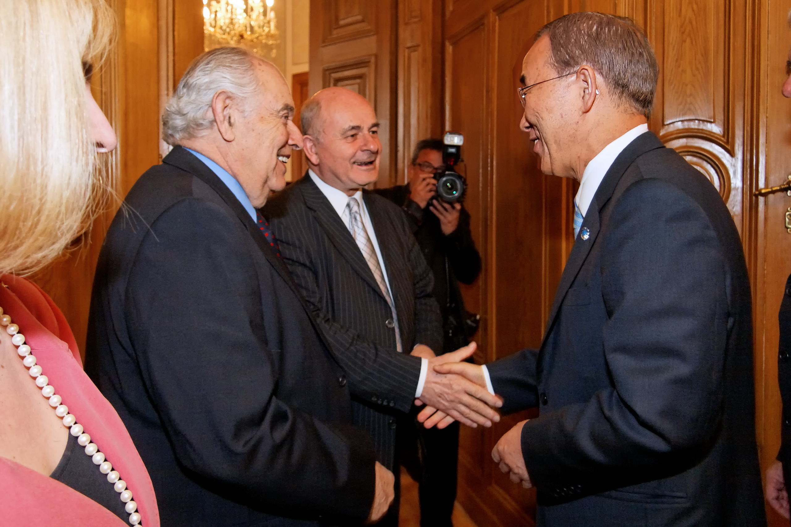 Simai Mihály a Magyar ENSZ Társaság elnöke és Gömbös Ervin a társaság főtitkára fogadja Pan Gimunt, az ENSZ főtitkárát (2007 és 2016 között) az MTA székházában.